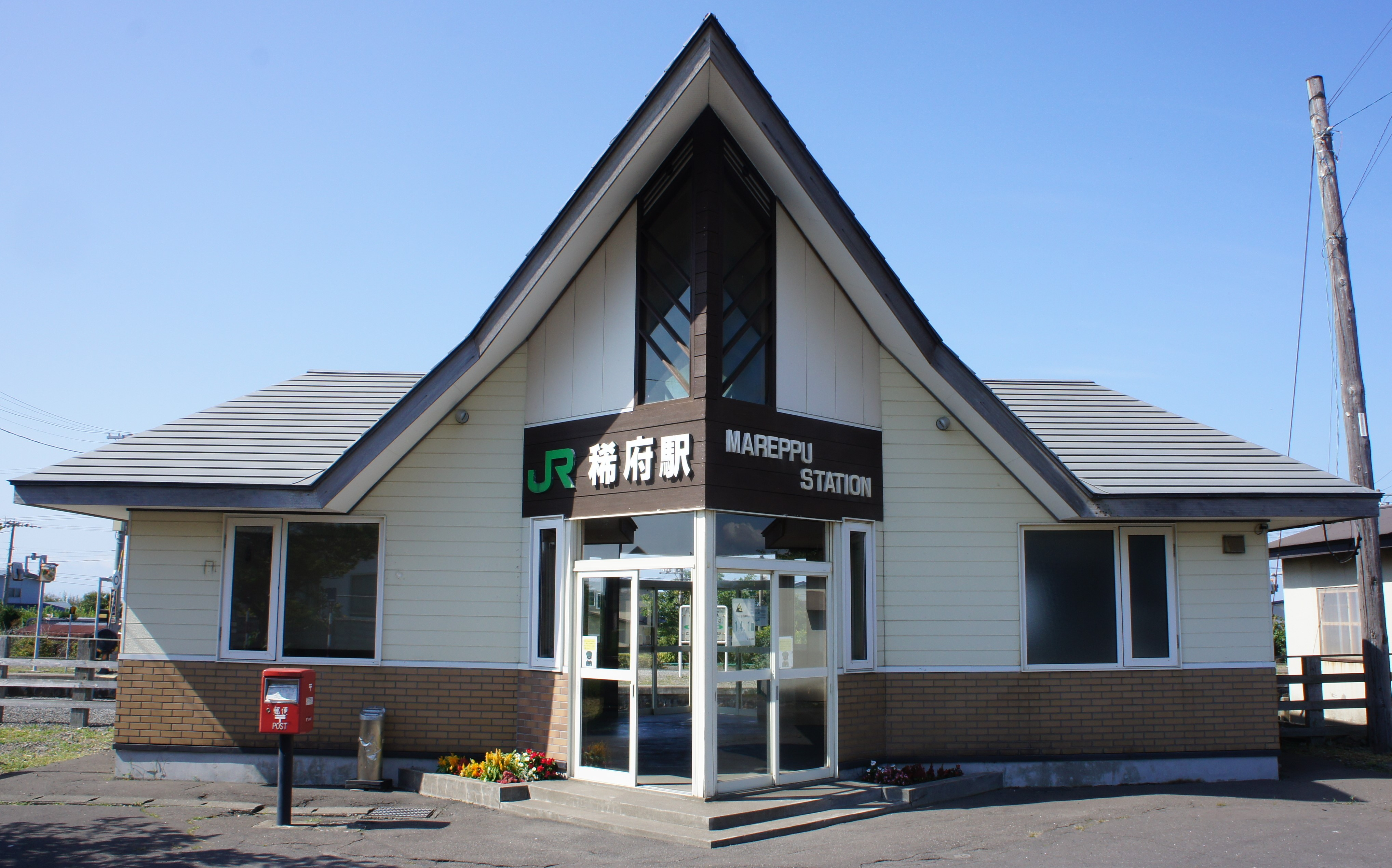 JR室蘭本線・稀府駅の駅舎